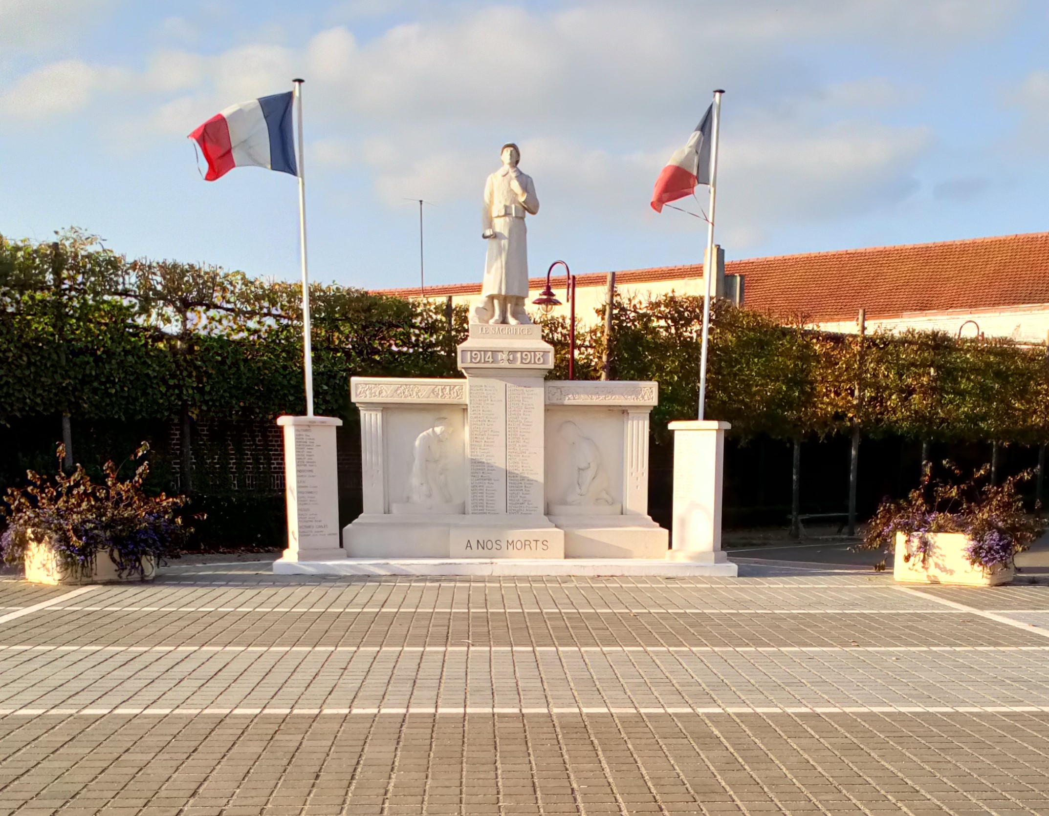 Monument aux morts (Rosières-en-Santerre) 1